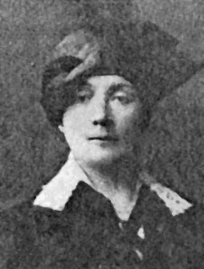 Ecaterina Arbore (n. 1873, Geneva, Elveția — d. 2 decembrie 1937, Tiraspol, RASS Moldovenească, URSS) a fost un medic-umanist, publicistă și militantă socialistă româncă, fiica lui Zamfir Ralli-Arbore și sora Ninei Arbore.